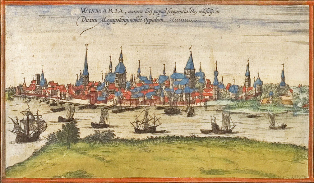 Entgegen der Überschrift Wismaria (Wismar) handelt es sich um eine Ansicht von Rostock. Die mit Rostochium (Rostock) betitelte Ansicht zeigt dementsprechend Wismar. Braun und Hogenberg verwechselten die Namen der Städte auf den beiden Ansichten.